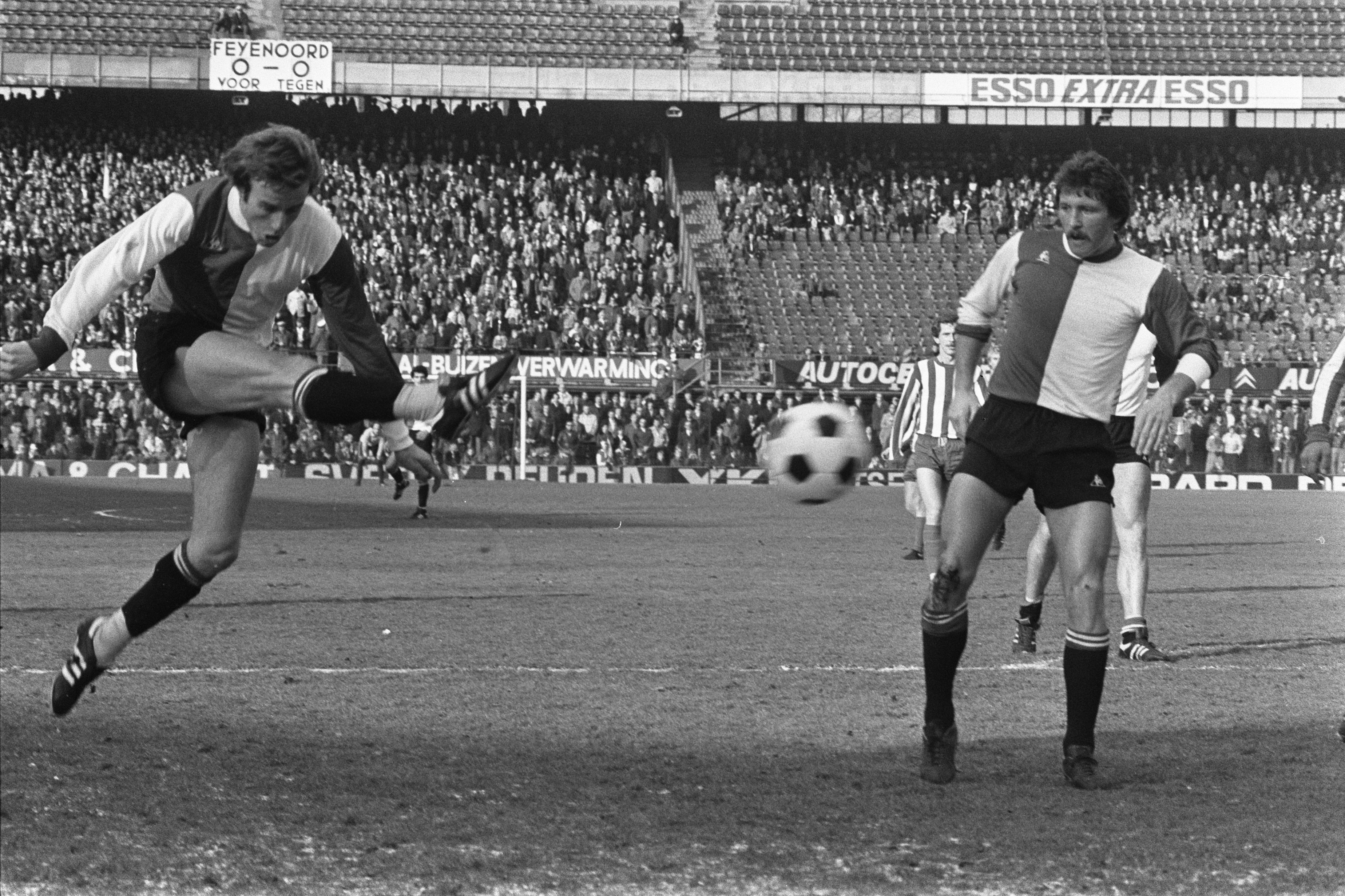 Collectie / Archief : Fotocollectie Anefo Reportage / Serie : [ onbekend ] Beschrijving : Feijenoord tegen Eindhoven 1-1; spelmomenten Annotatie : Martien Vreijsen schiet. Willi Kreuz kijkt toe Datum : 30 januari 1977 Locatie : Rotterdam Trefwoorden : sport, voetbal Instellingsnaam : Feyenoord Fotograaf : Verhoeff, Bert / Anefo, [onbekend] Auteursrechthebbende : Nationaal Archief Materiaalsoort : Negatief (zwart/wit) Nummer archiefinventaris : bekijk toegang 2.24.01.05 Bestanddeelnummer : 929-0026